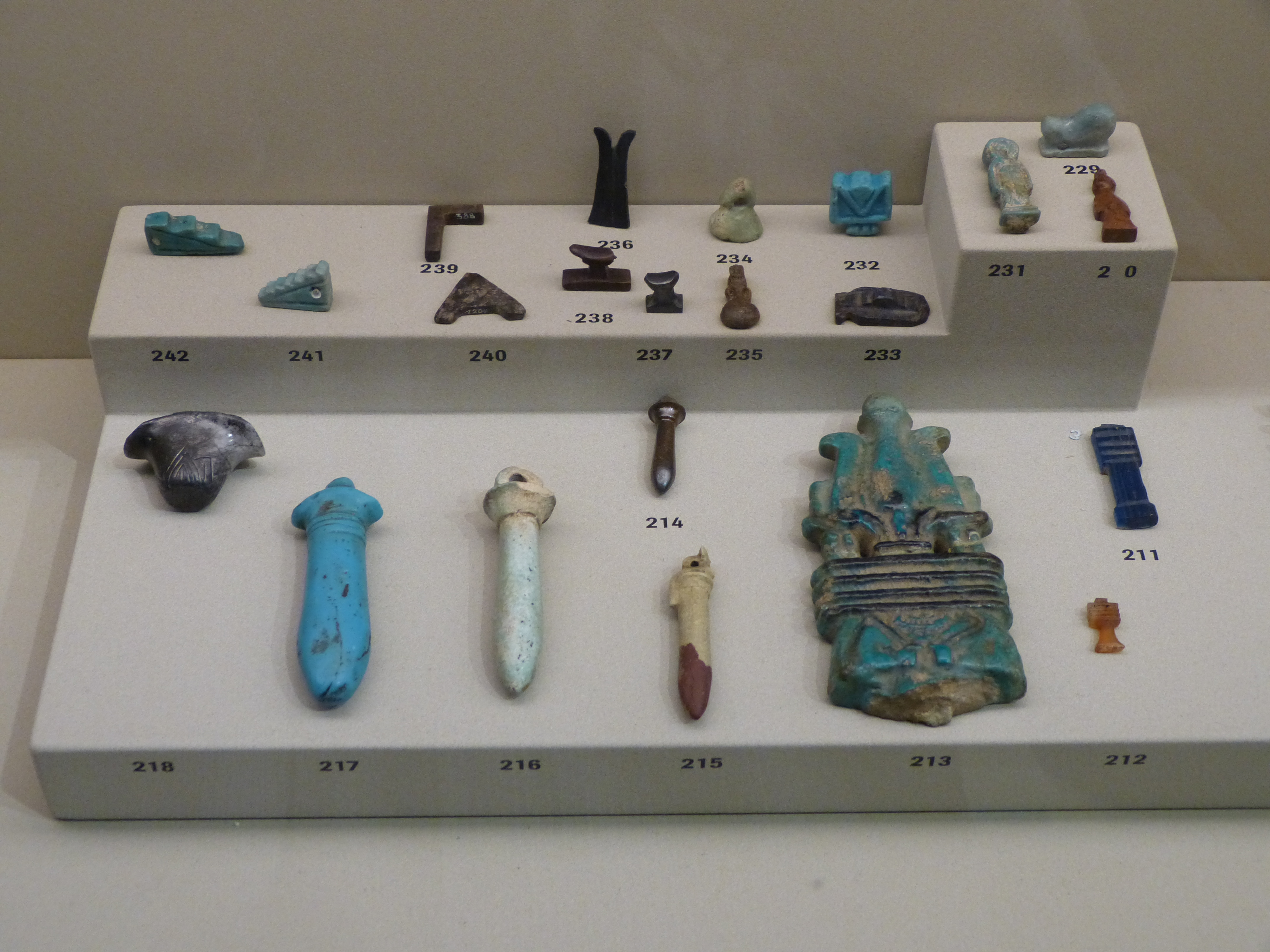 Museum der Universität Tübingen